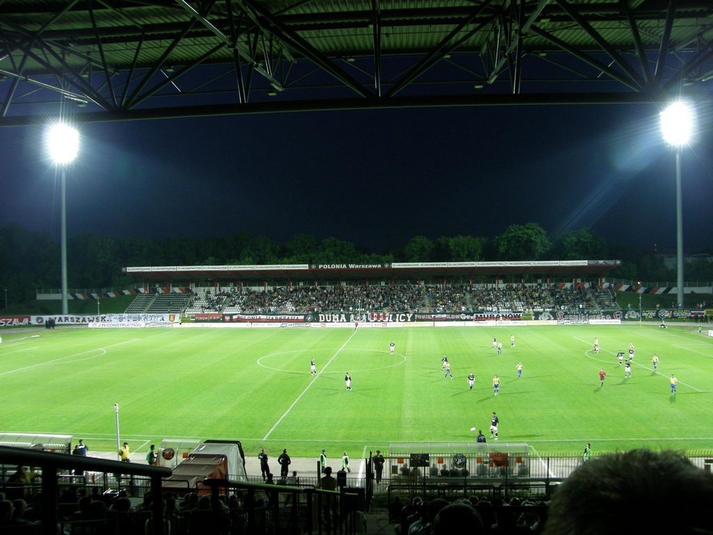 Trybuna Kamienna na stadionie Polonii Warszawa